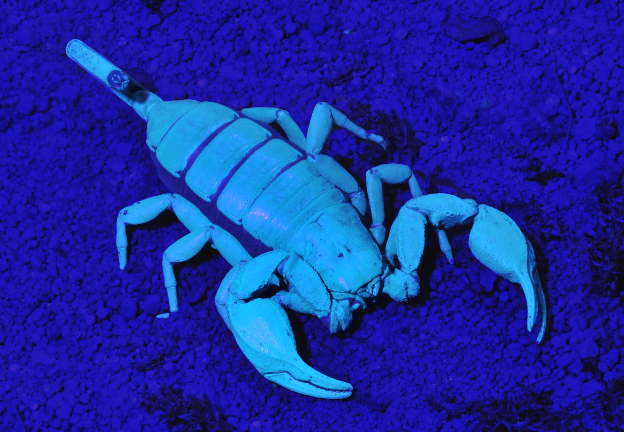 Euscorpius italicus im UV-Licht, Terrarienhaltung, Deutschland